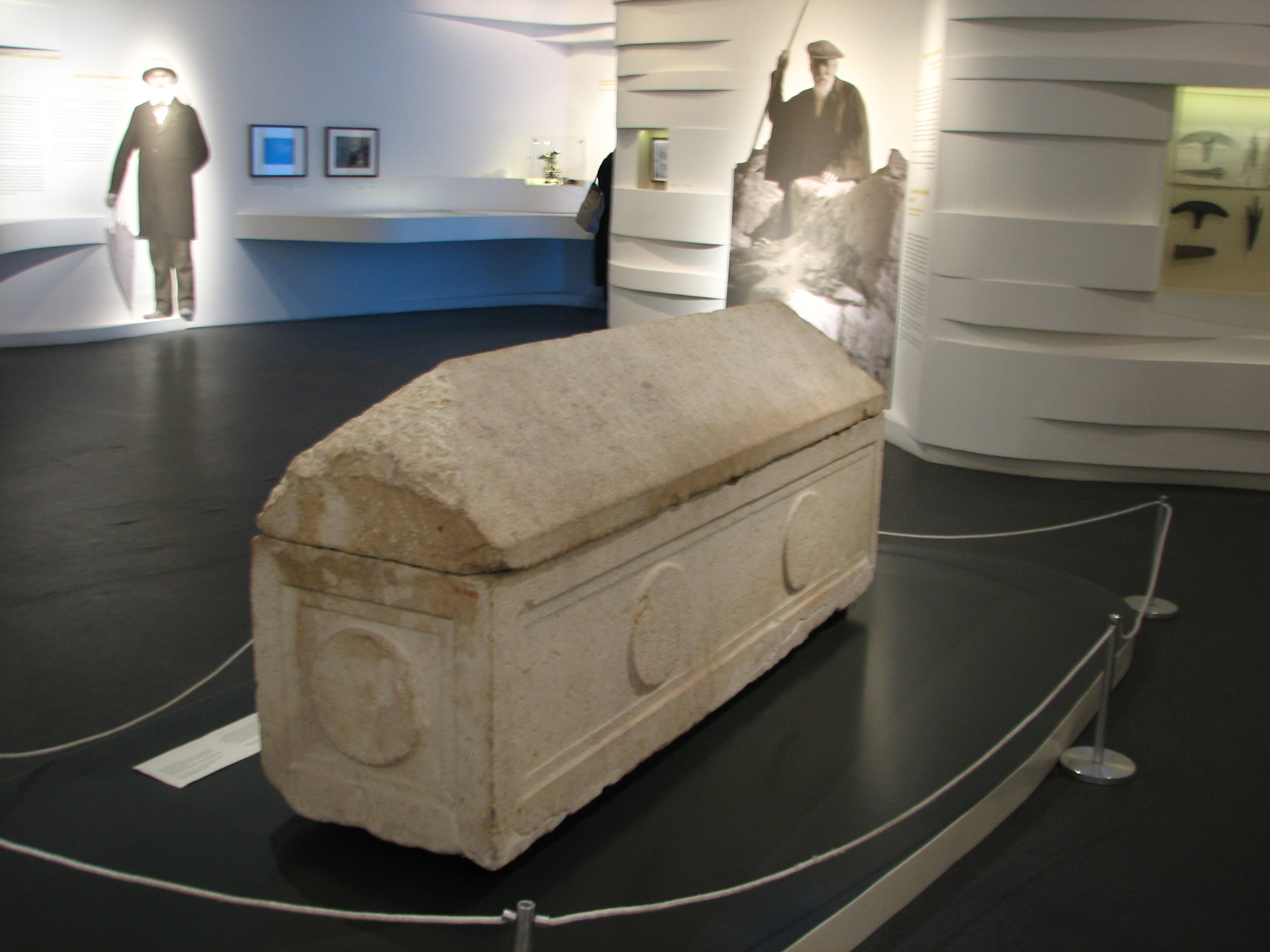 Sarcophagus of Helena was queen of Adiabene and wife of Monobaz I. הסרקופג של הלני המלכה (נפטרה בסביבות שנת 56 לספירה) הייתה מלכת חֲדָיֵבּ שבאשור מצפון לסהר הפורה, במאה הראשונה לספירה.